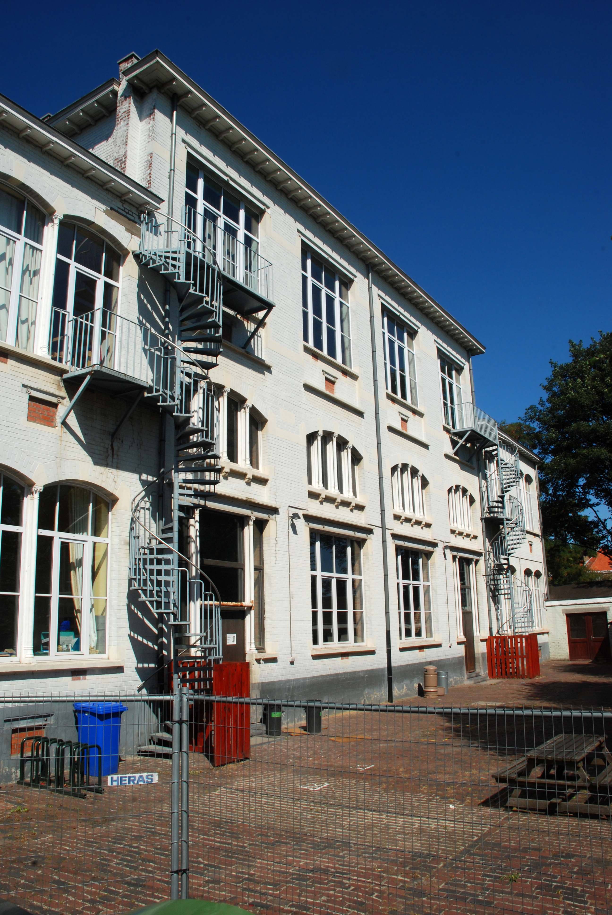 Belgique - Bruxelles - École Vervloesem